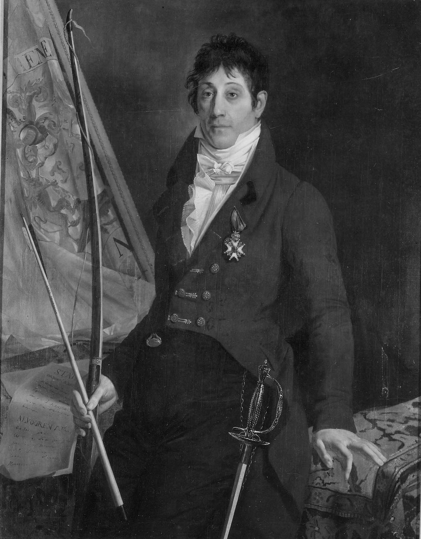 J. J. van Zuylen van Nyevelt